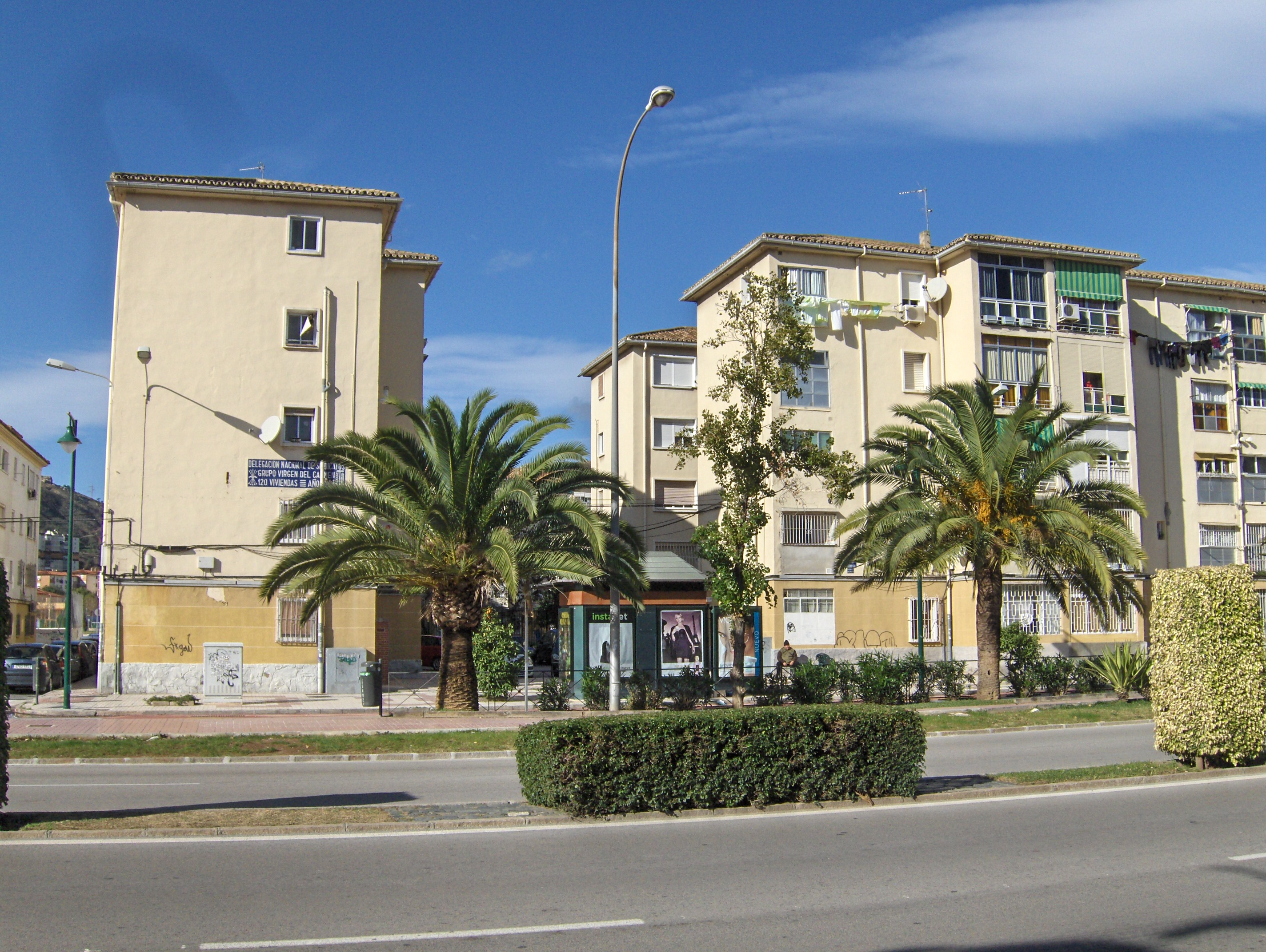 Viviendas del grupo Virgen del Carmen, Málaga, España.